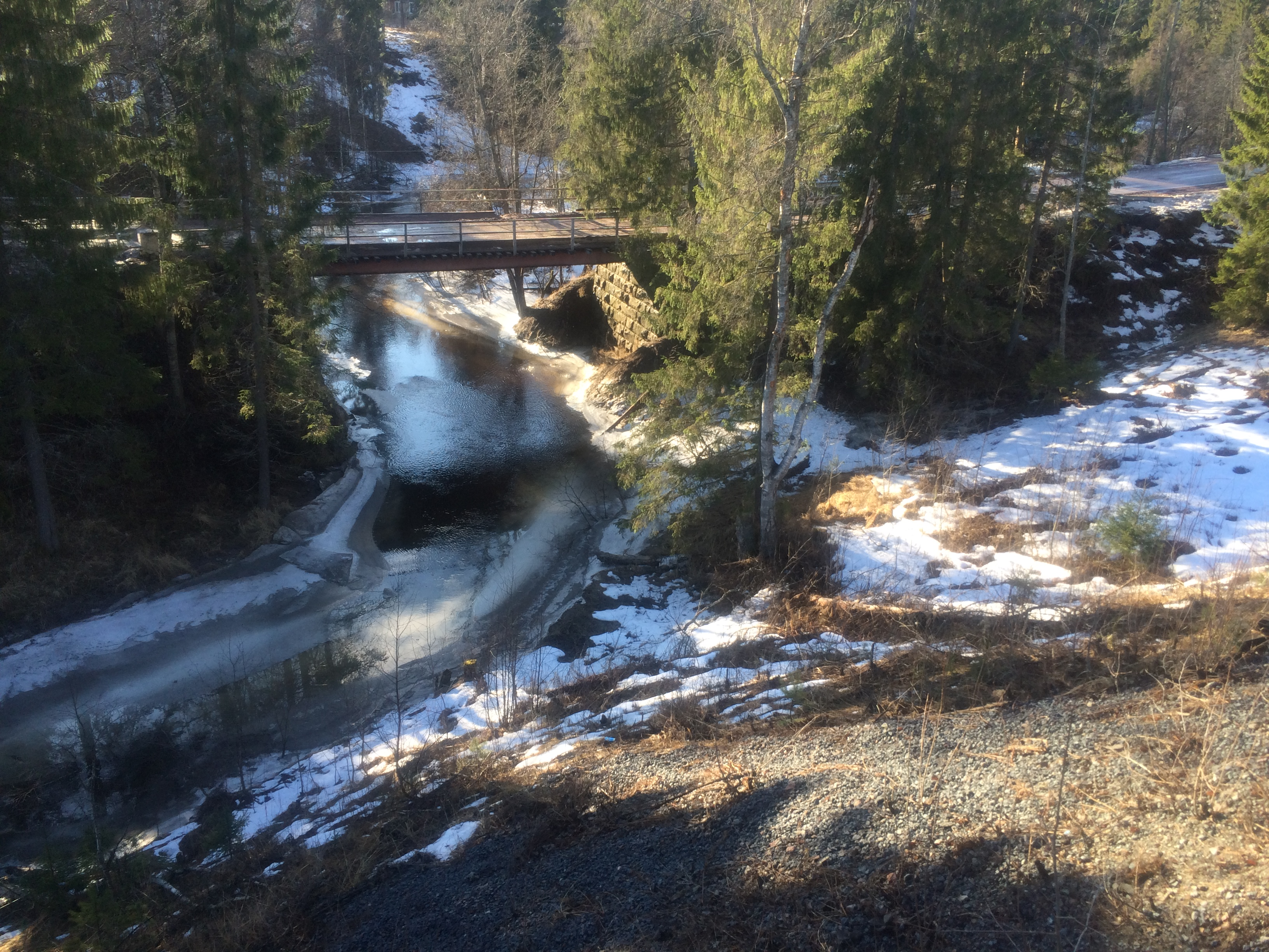 р. Леютёоя вид с железнодорожного моста в пос. Харлу.